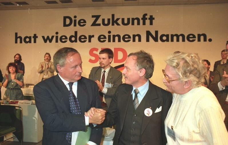 ADN-ZB/Kluge/23.2.90/ Leipzig: SPD-Parteitag Während des 1. ordentlichen SPS-Parteitages in Markkleeberg trafen der saarländische Ministerpräsident Oskar Lafontaine (l.) und der SPD-Geschäftsführer Ibrahim Böhme (r.) zusammen.